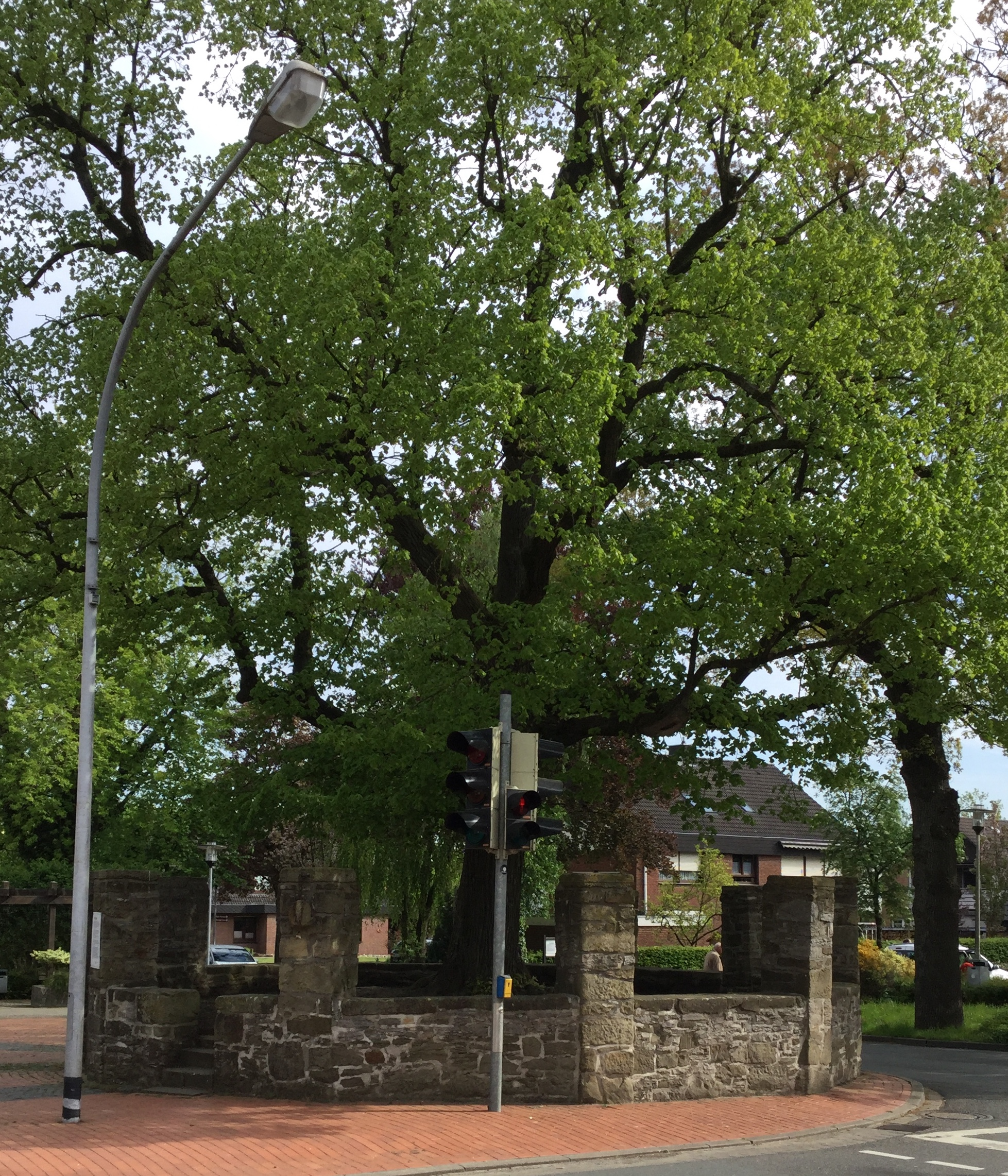 Mittelalterliche Gerichtslinde in Melle-Gesmold